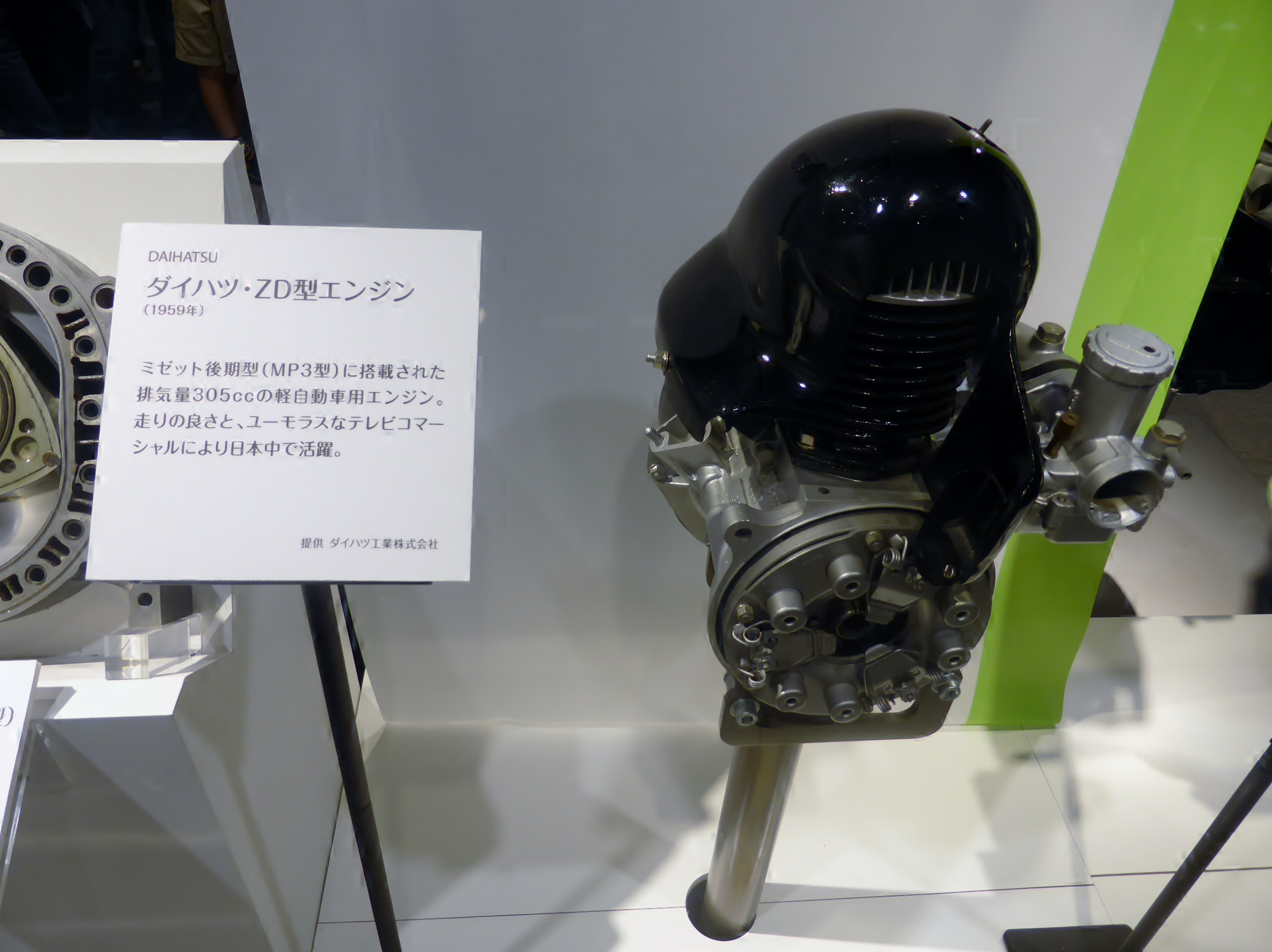 ダイハツ・ZD型エンジンを撮影。